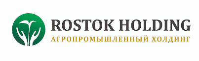 Логотип "Росток-Холдингу"